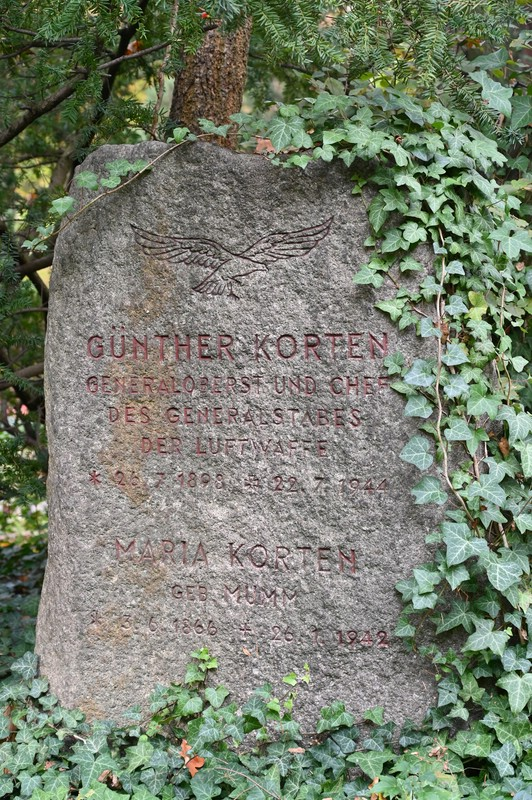 Grab von Günther und Maria Korten auf dem Friedhof Steglitz in Berlin am 21. Oktober 2019.